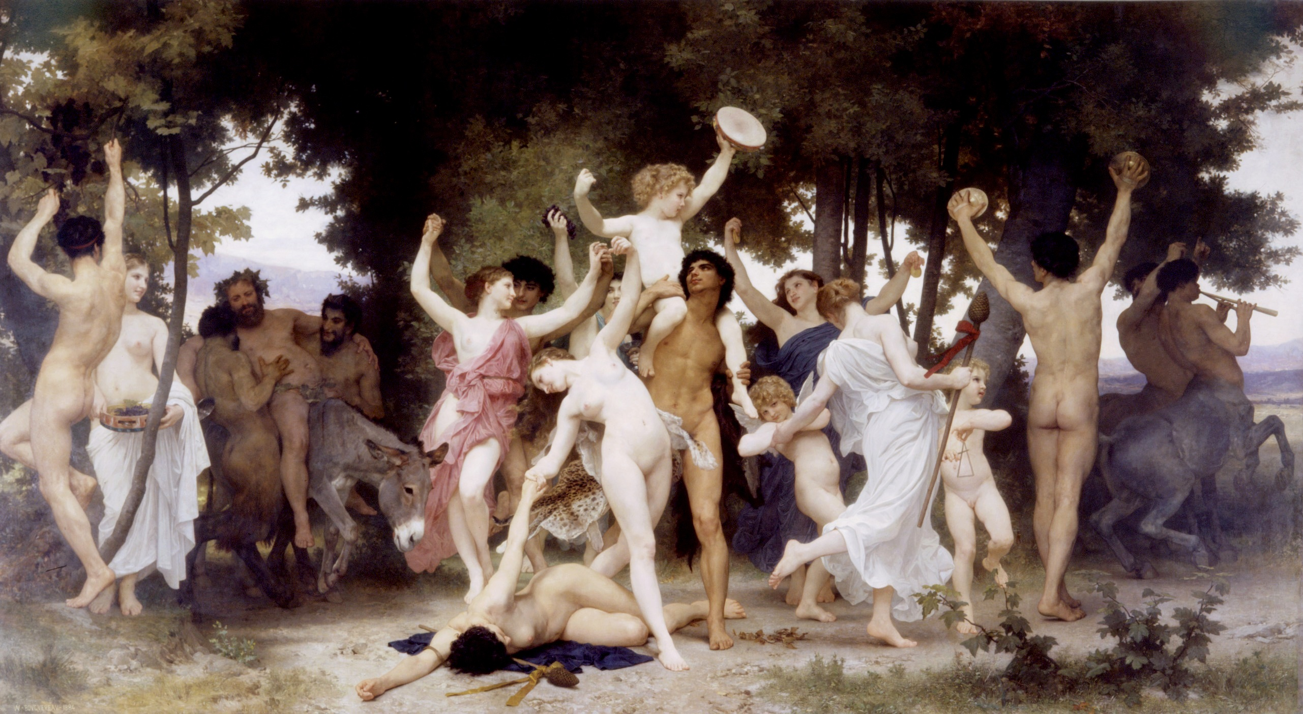 La jeunesse de Bacchustitle QS:P1476,fr:"La jeunesse de Bacchus" label QS:Lfr,"La jeunesse de Bacchus"